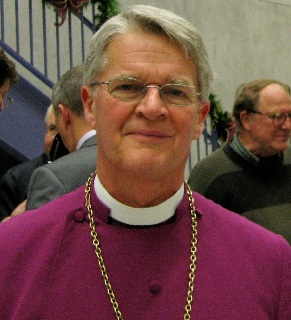 Frank Griswold